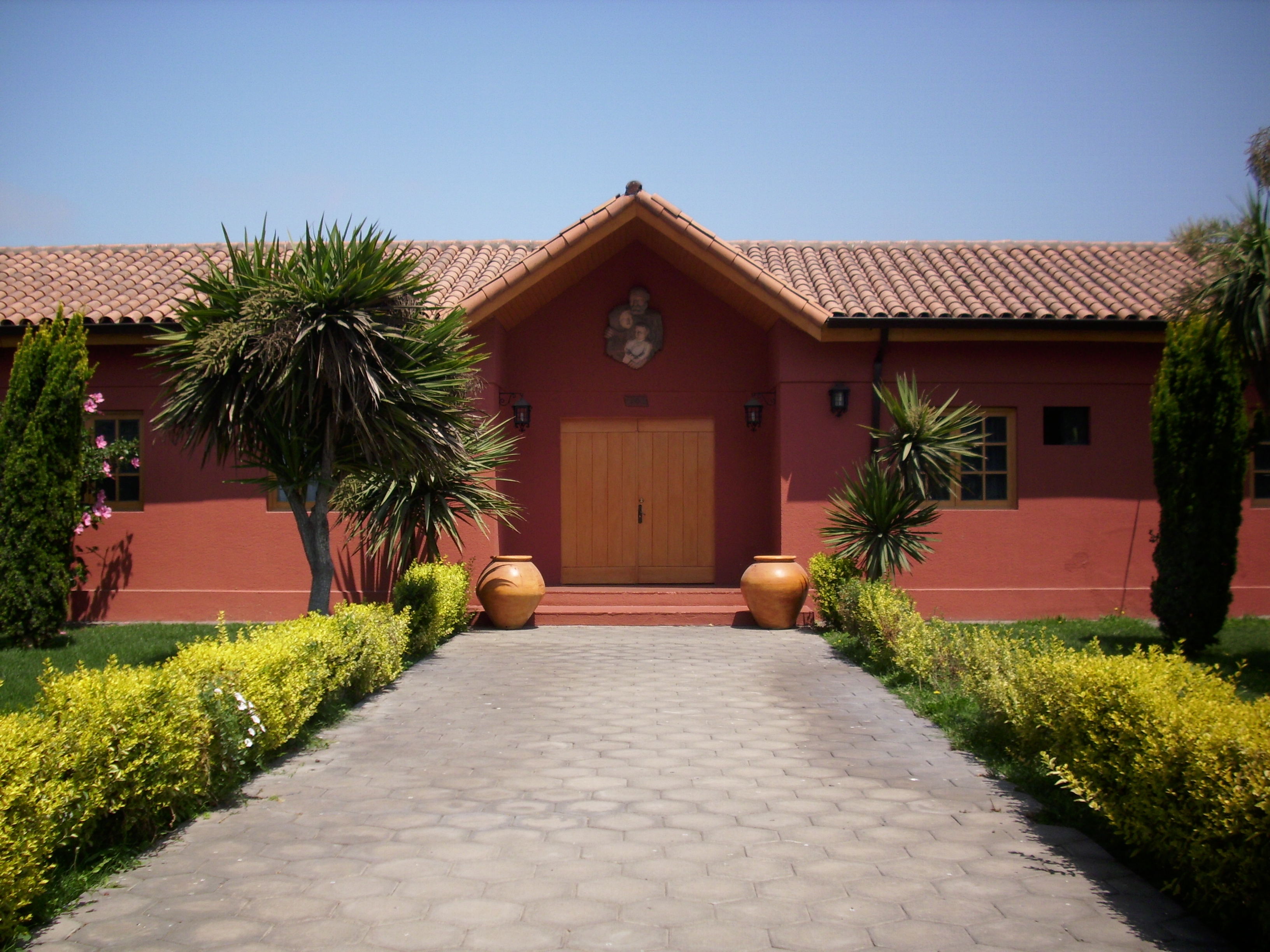 La fachada del Seminario Piamartino ubicado en calle Carmen 1506, a un costado del colegio C.E.P. Carolina Llona de Cuevas, en la comuna de Maipú.